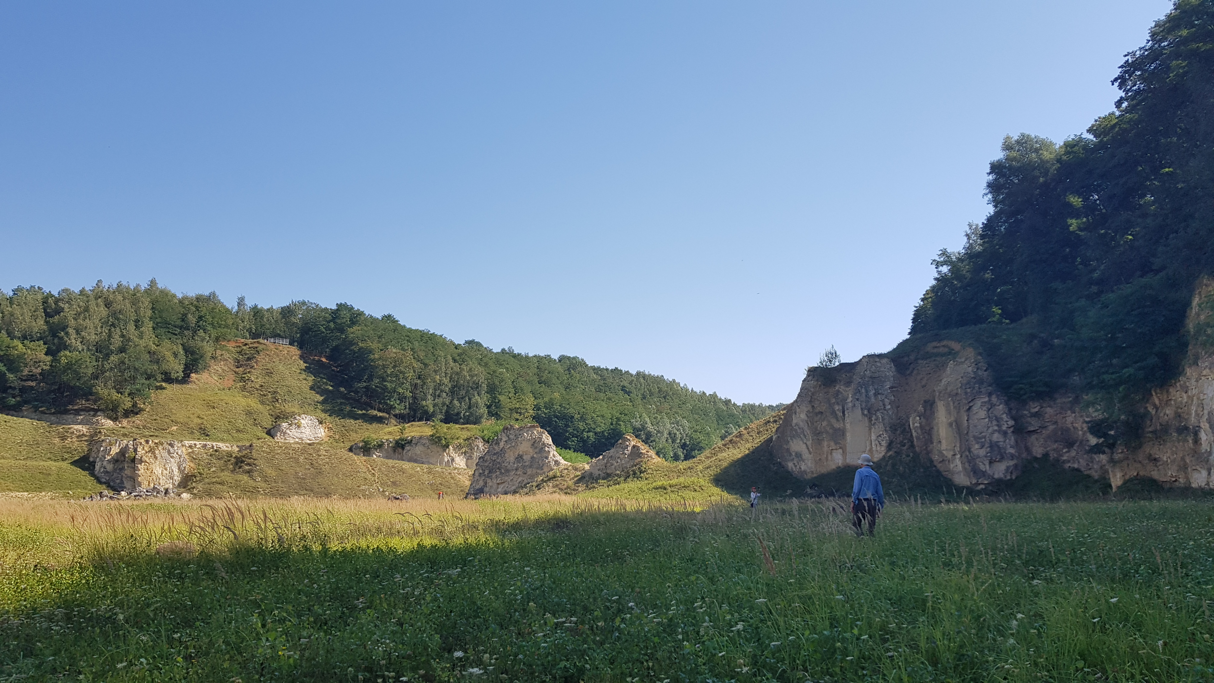 Curfsgroeve, Geulhem, Nederland